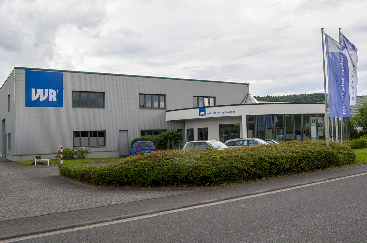 Verkehrs-Verlag Remagen, company building, Remagen, Germany Verkehrs-Verlag Remagen, Firmensitz, Geschwister-Scholl-Straße 9